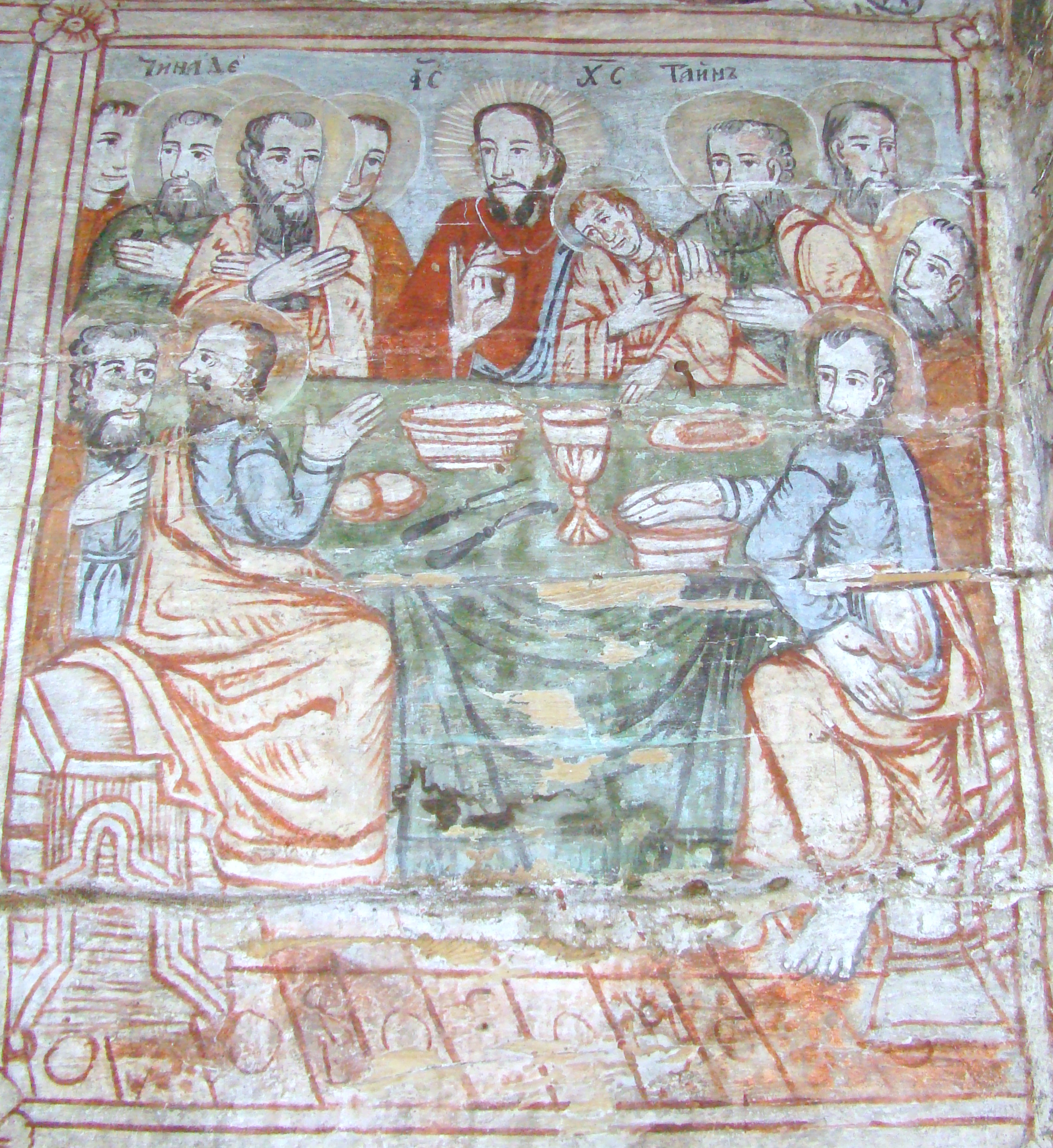 Biserica de lemn din Racâș, județul Sălaj